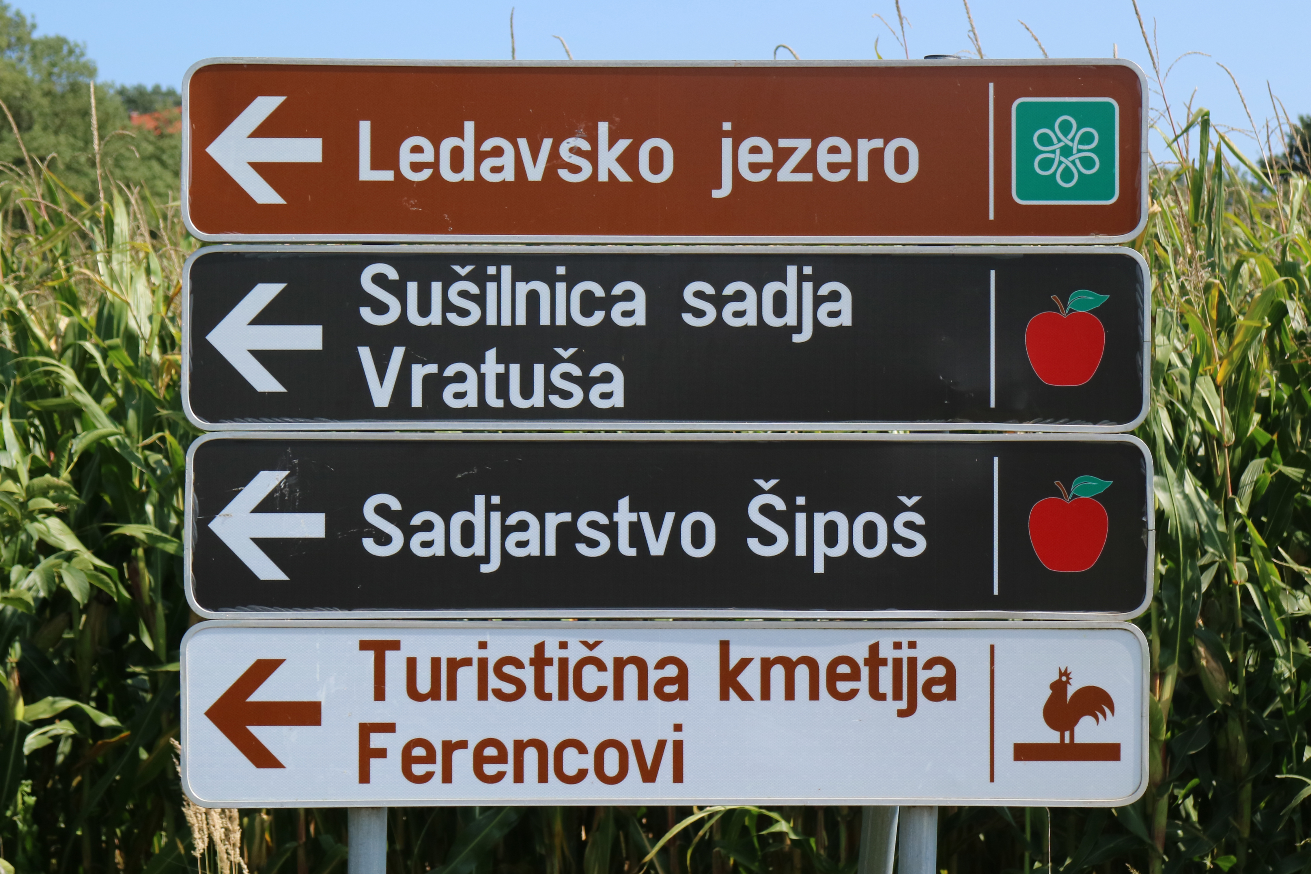 Wegweiser zum Ledavsko jezero, Gemeinde Cankova, Slowenien